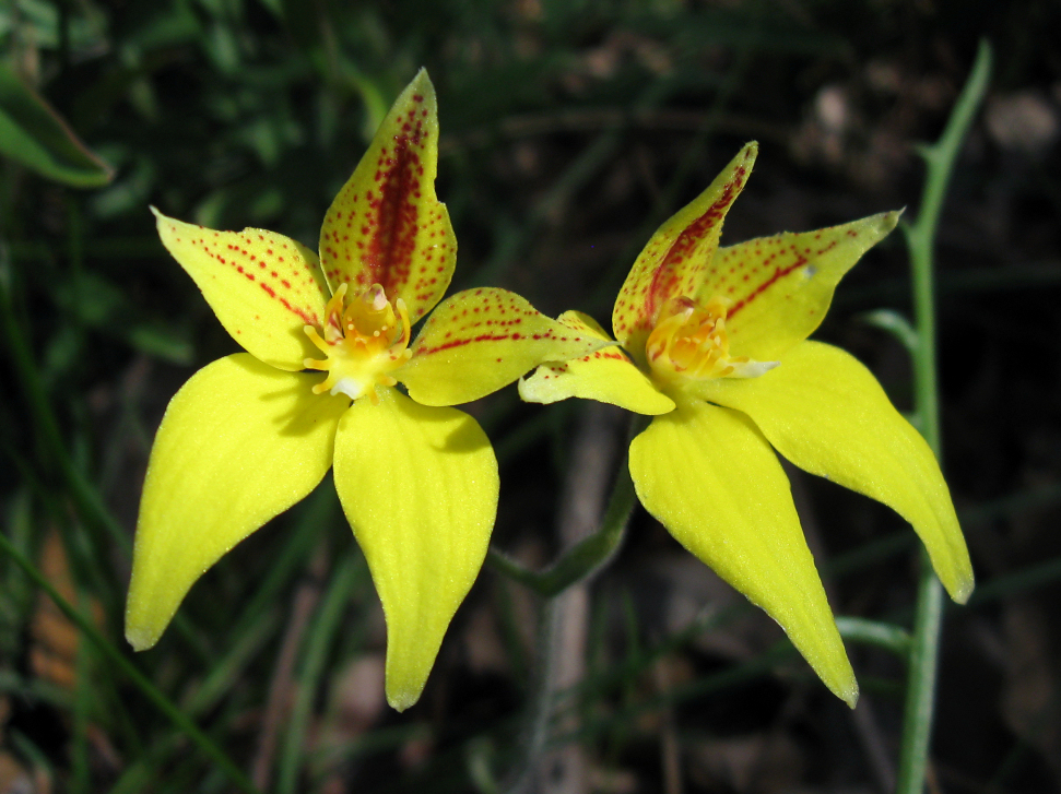 Caladenia flava Cowslips